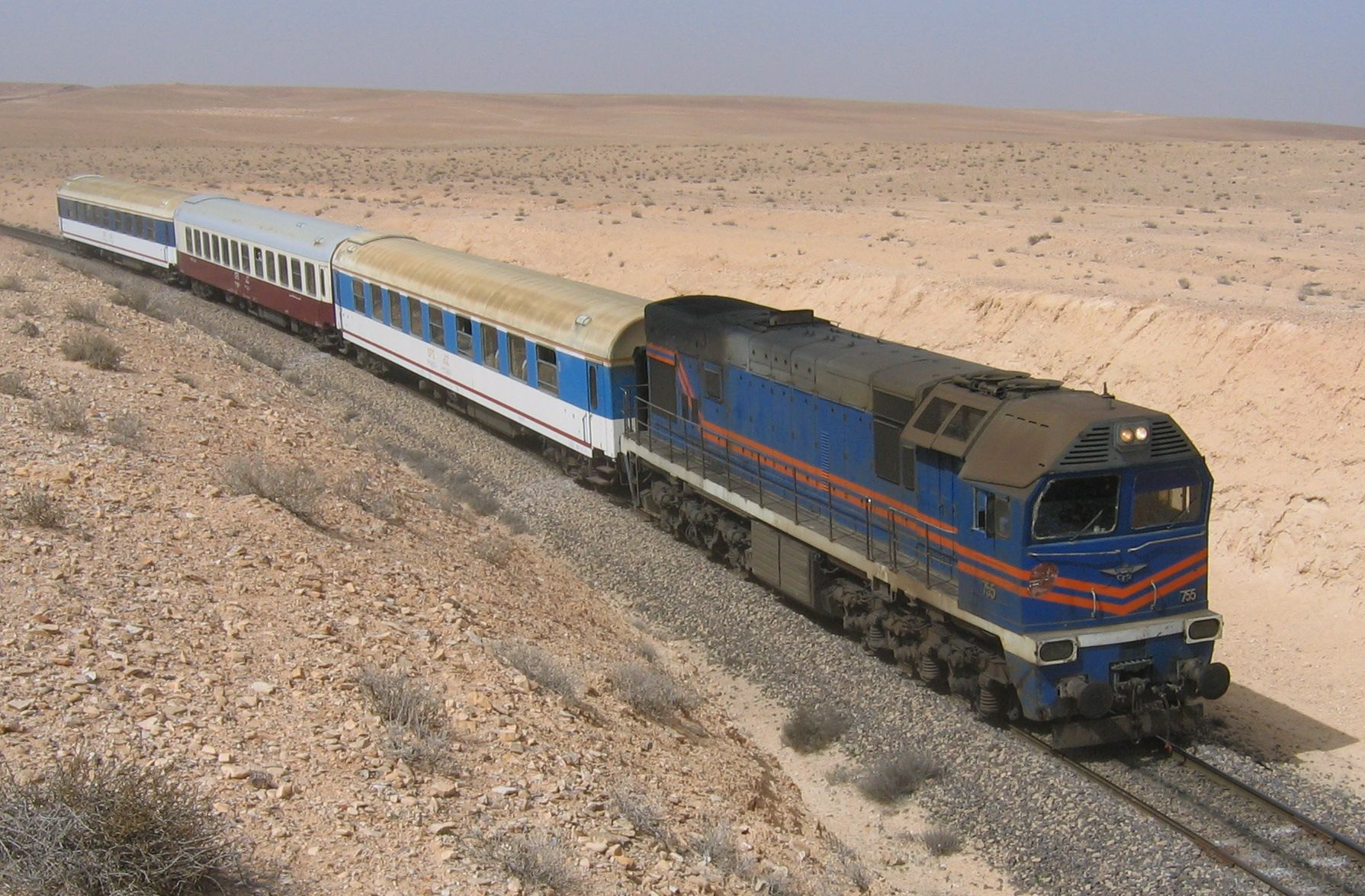 Auf der Strecke Mahin-Al Sharkia, eigene Aufnahme, 24.2.2007